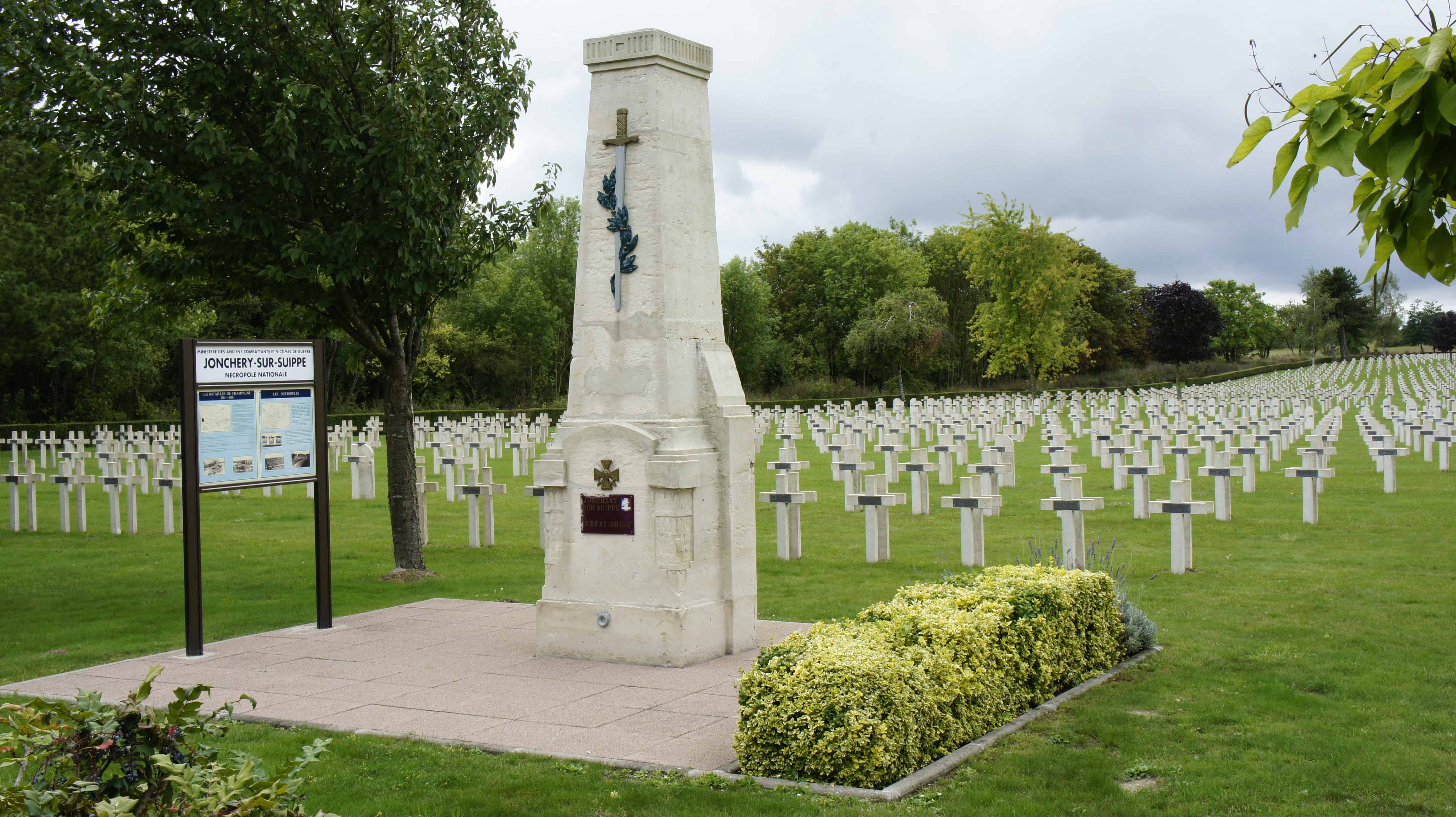 Vue de la nécropole nationale de Jonchery-sur-Suippe où sont regroupés les corps de 7 906 soldats français et quatre soldats tchécoslovaques tombés lors de la guerre 14-14.